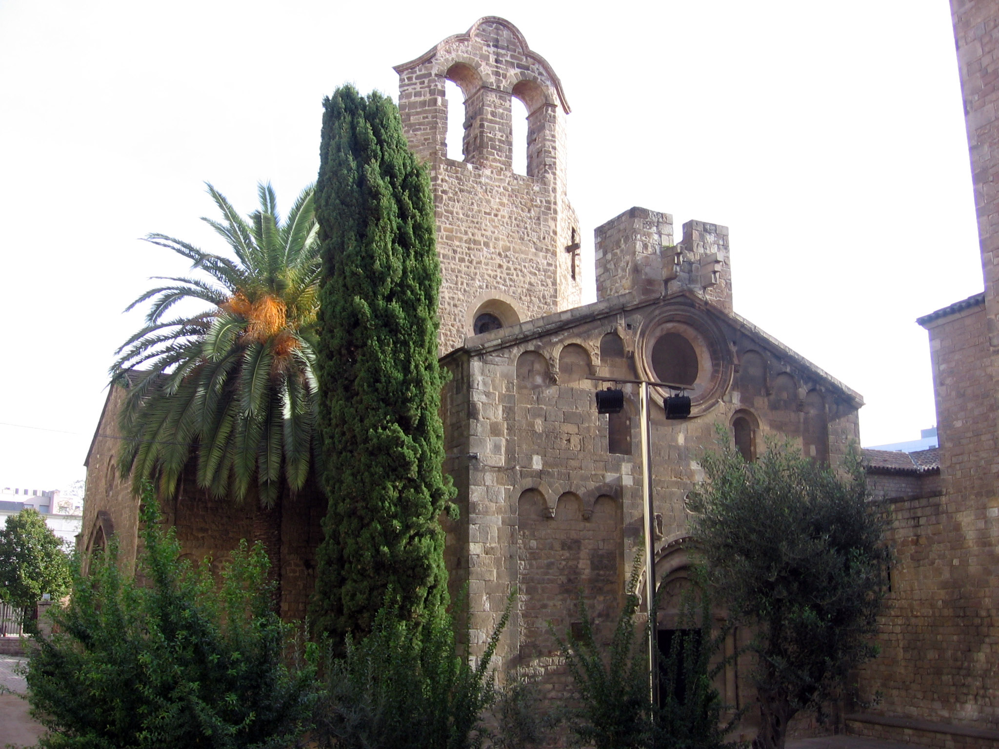 Iglesia de Sant Pau del Camp.